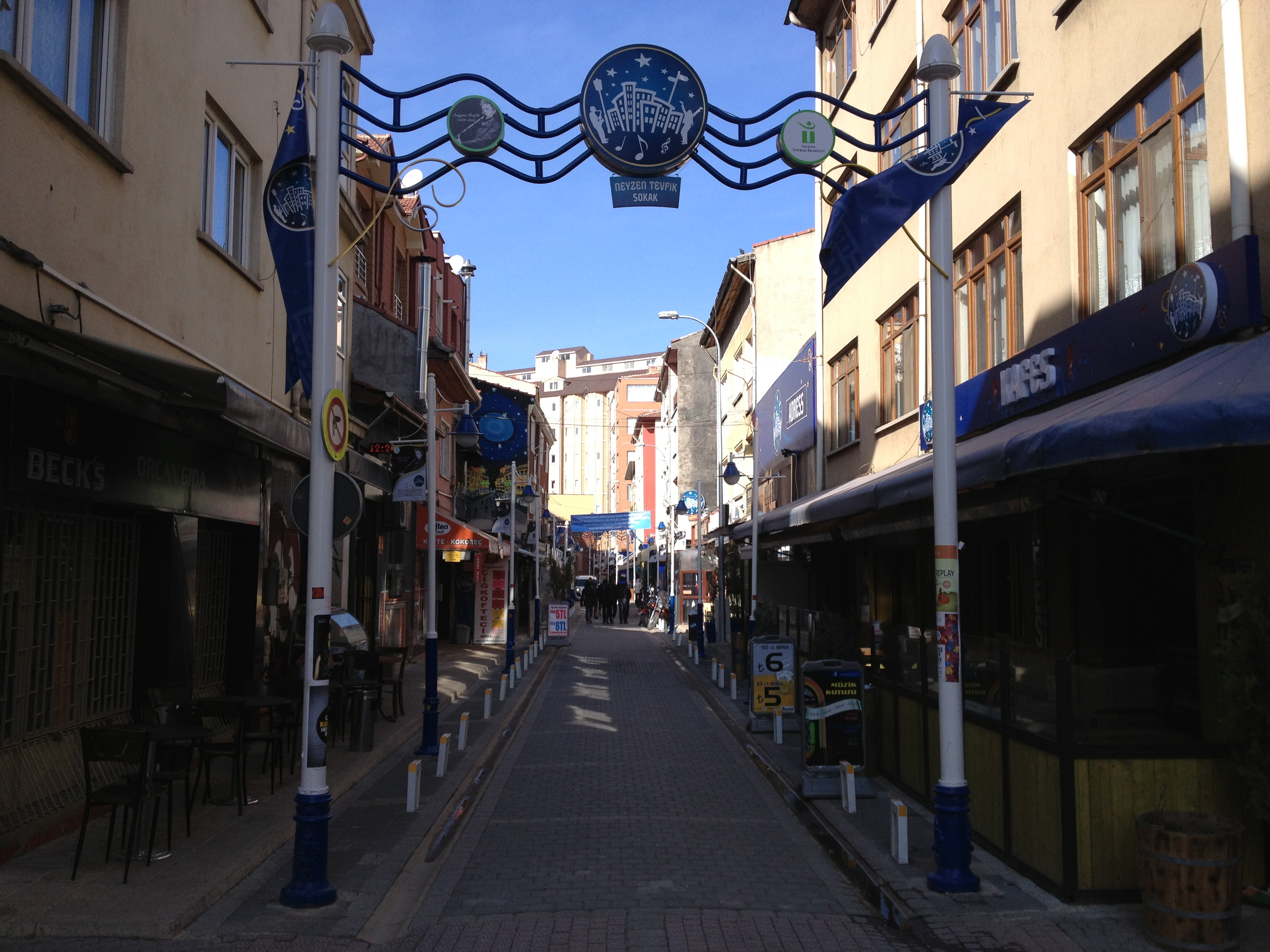 Eskişehir Barlar Sokağı